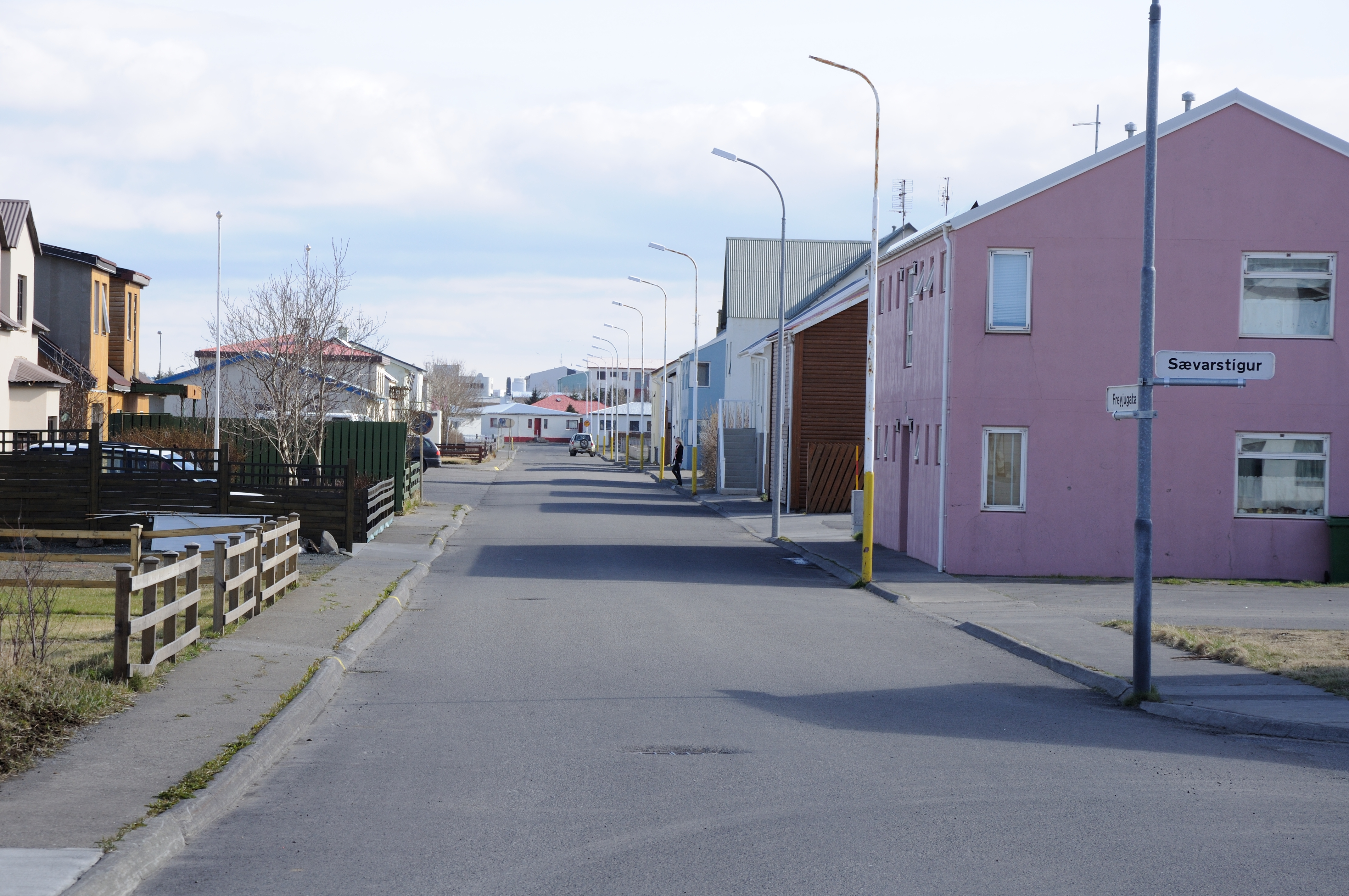 Iceland, Sauðárkrókur